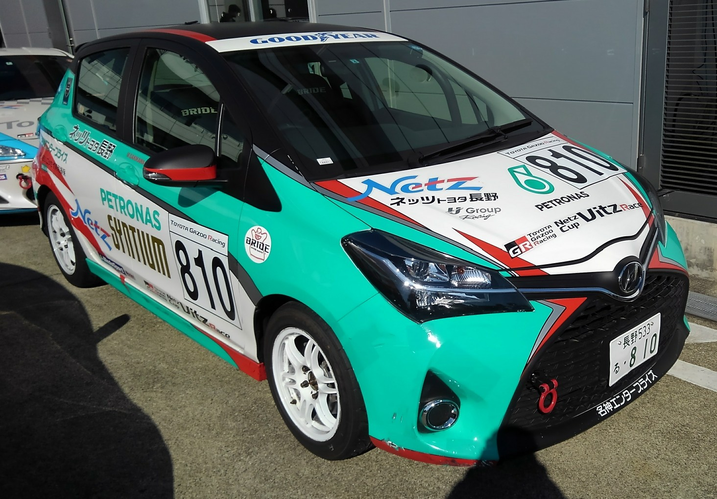 ネッツトヨタ長野のネッツカップ・ヴィッツレースのマシン（2018年）